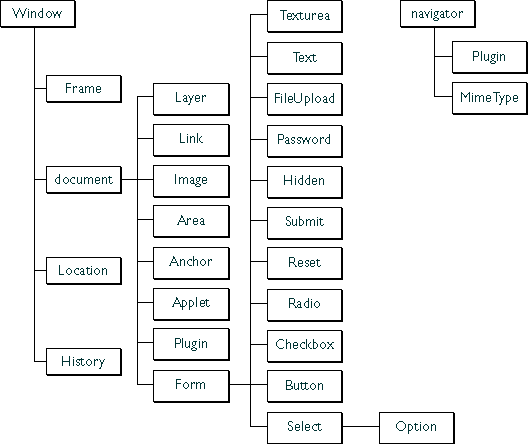 Rappresentazione della JS DOM del javascript